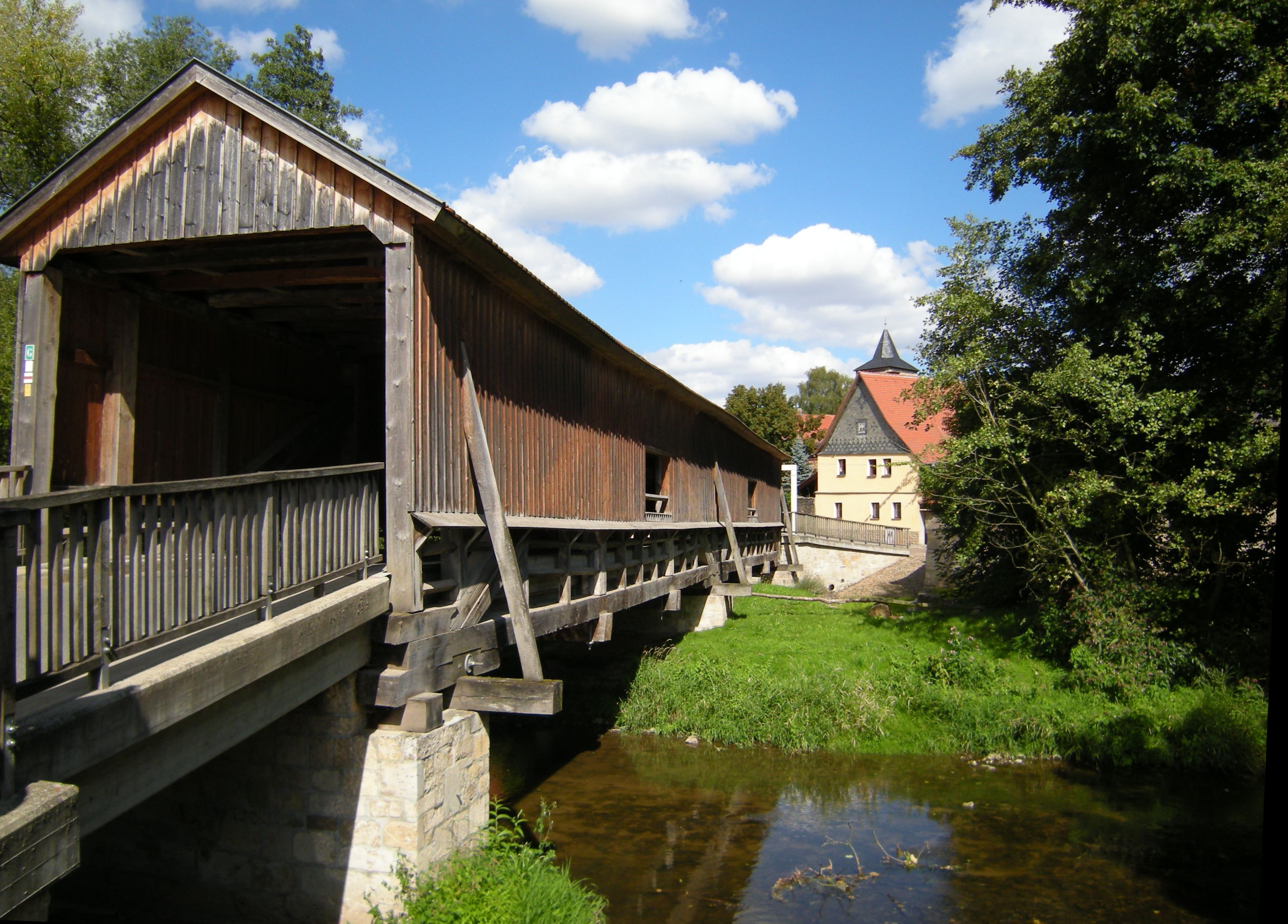 Buchfart-Alte Holzbrücke1613 über die Ilm.jpg